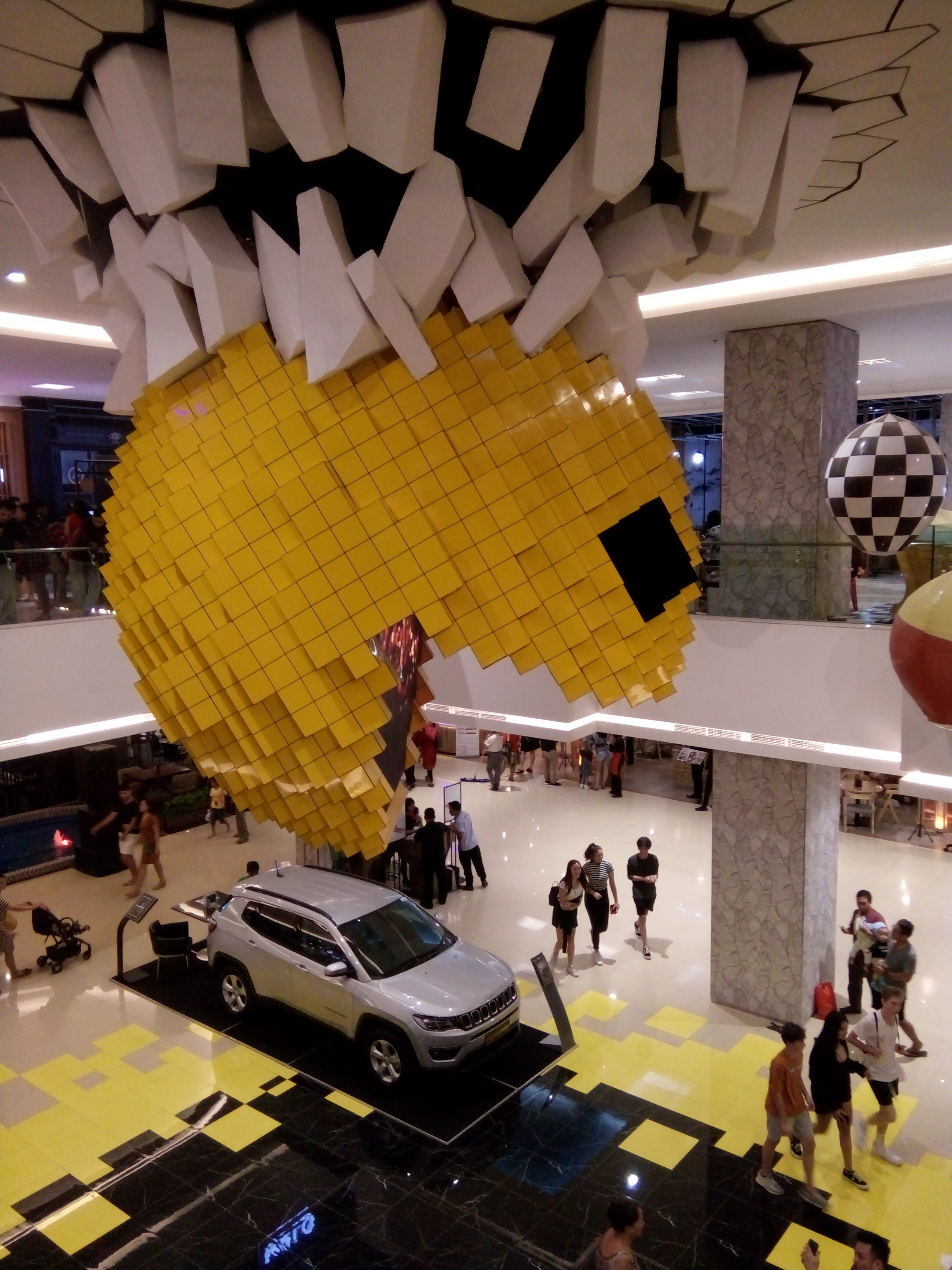 Trans Studio Denlasar, Bali, Indonesia